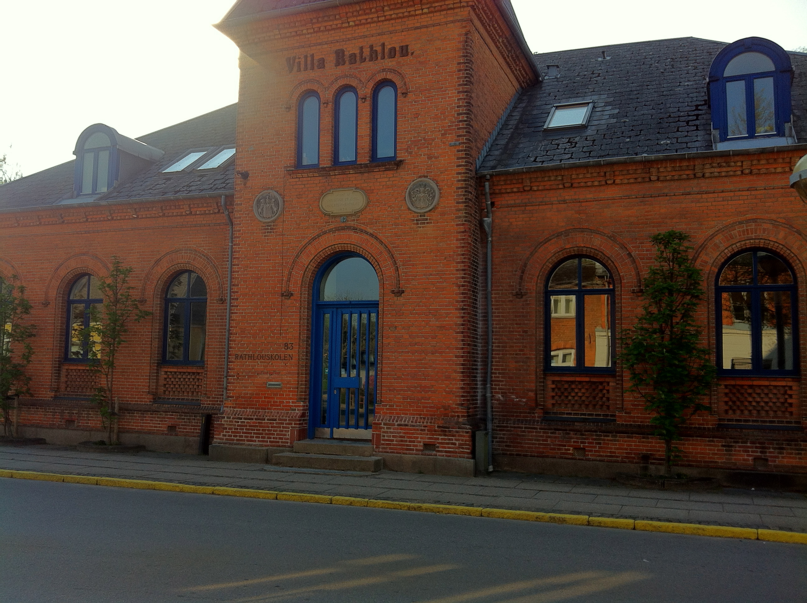 Rathlouskolen administration også kladet "Villa Rathlou".